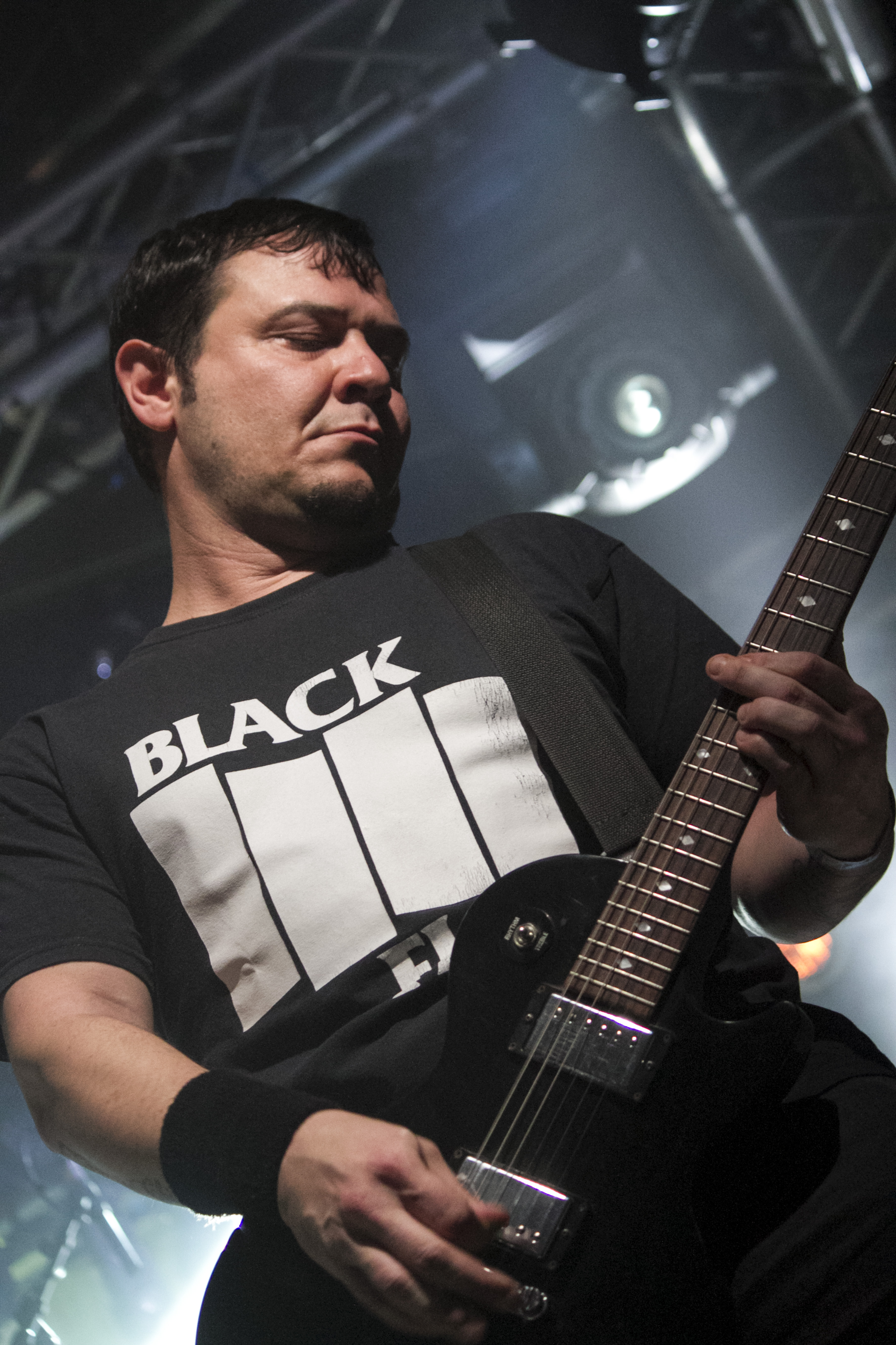 Paolo (Chinaski) Pavanello (La speranza è una trappola, tour)